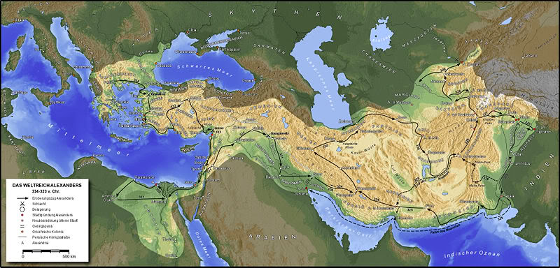 Карта завоеваний Александра Великого с маршрутами.